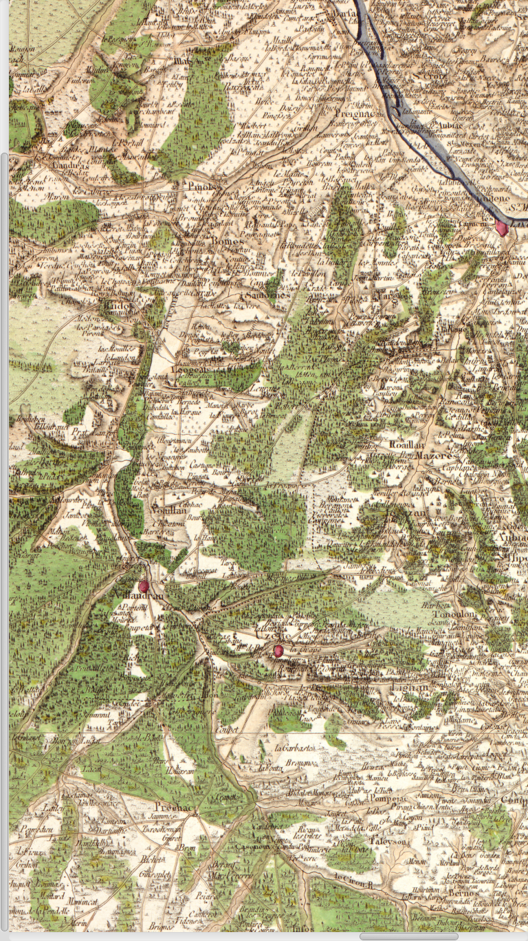 Carte de Cassini n°105 (Gironde, zoom sur le Ciron), 1756.